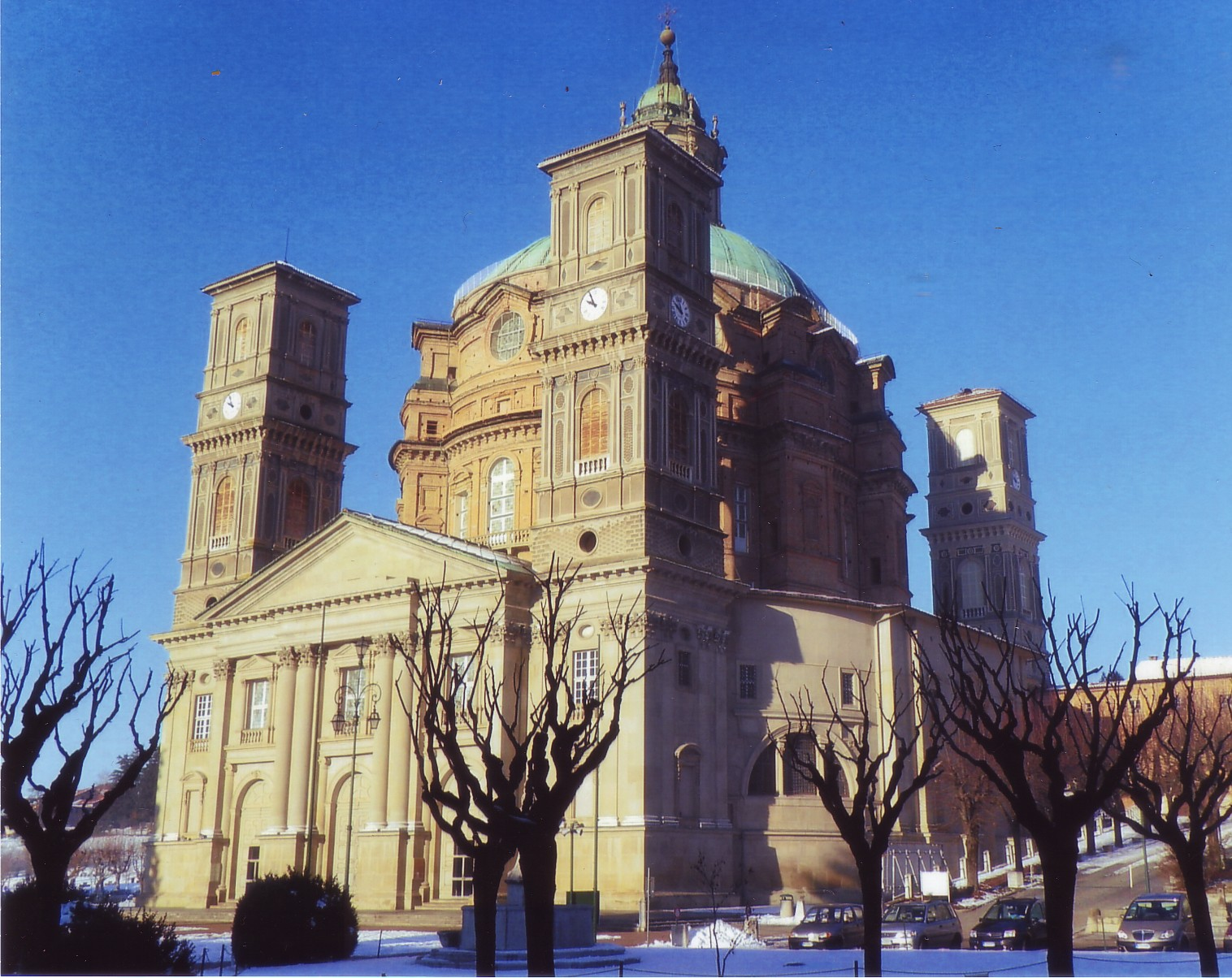 Santuario di Vicoforte presso Mondovì